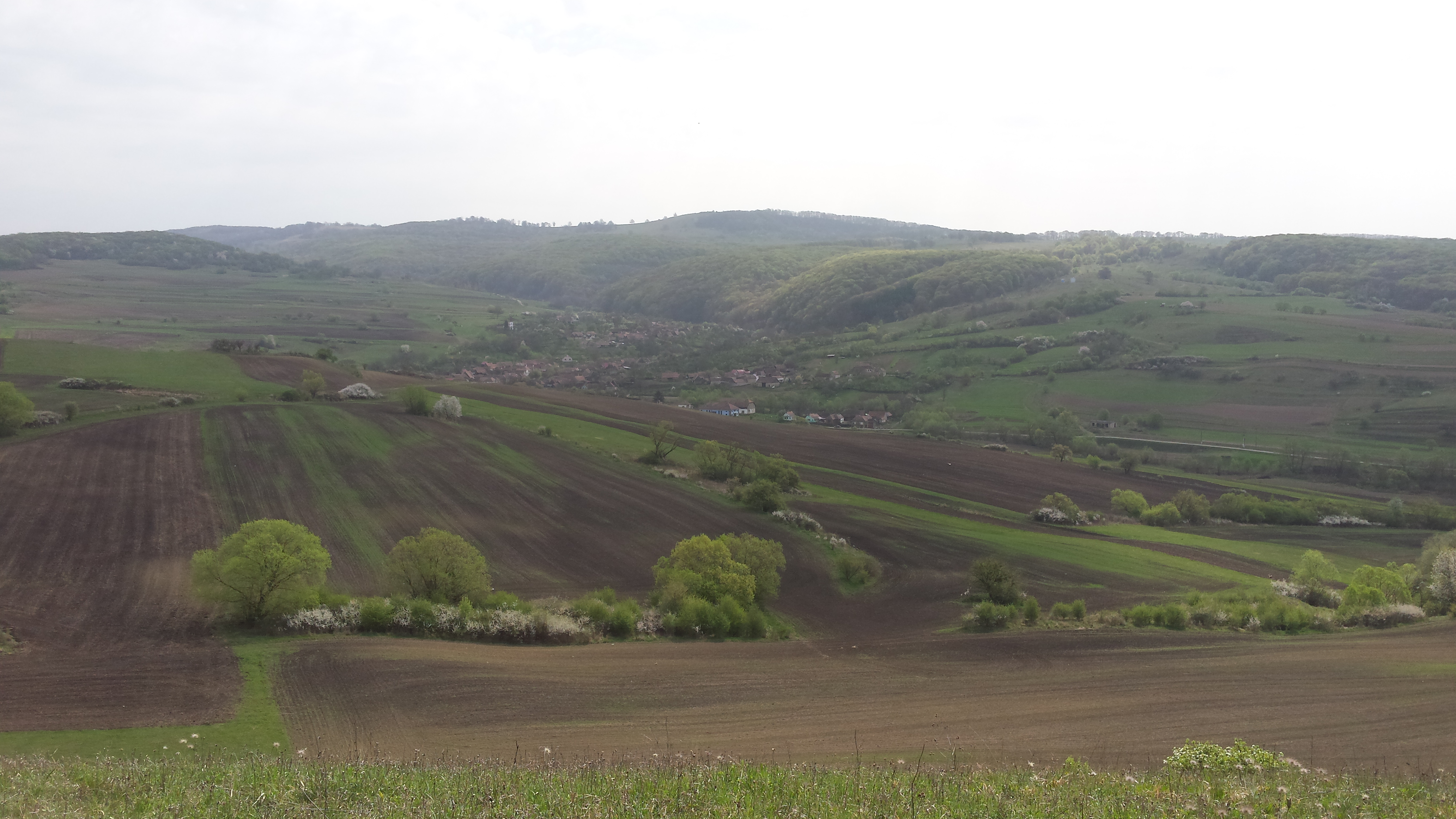 Satul Feleag impreuna cu Dealul Pietris pe fundal.